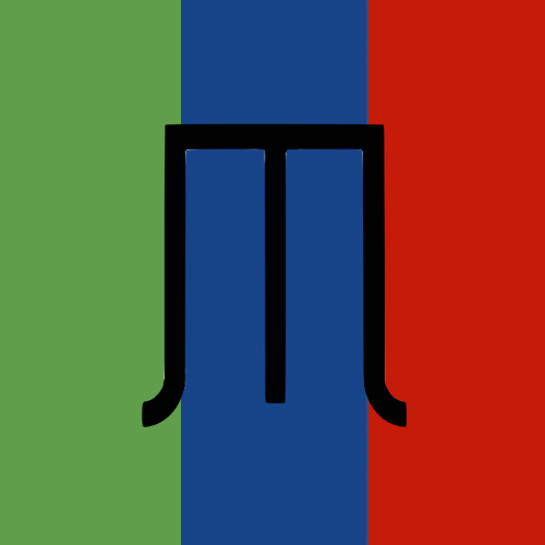 Hierro de la ganadería de los Hnos. Fraile Mazas